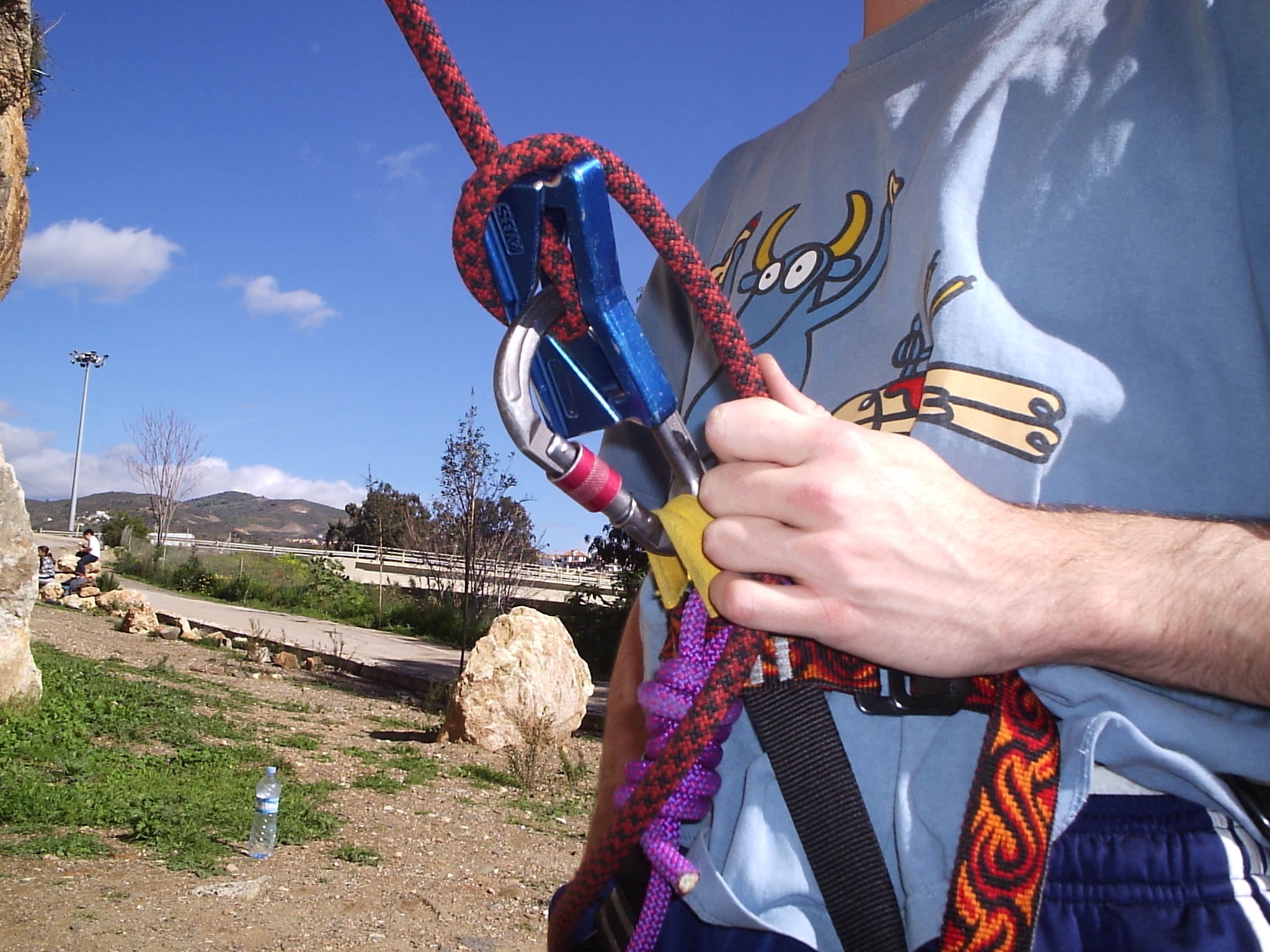 Maniobra para rapelar o descolgar al compañero con el ABS de Alp'Tech